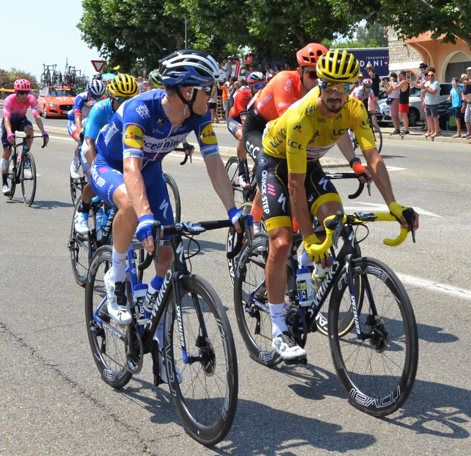 Julian Alaphilippe lors de la 17ème étape du Tour de France 2019